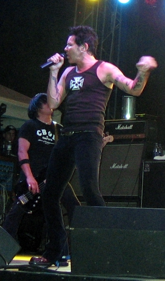 Jizzy Pearl